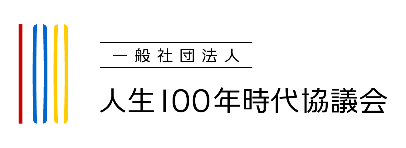 人生100年時代協議会ロゴ